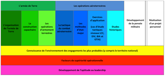 formation à l'EDG-T